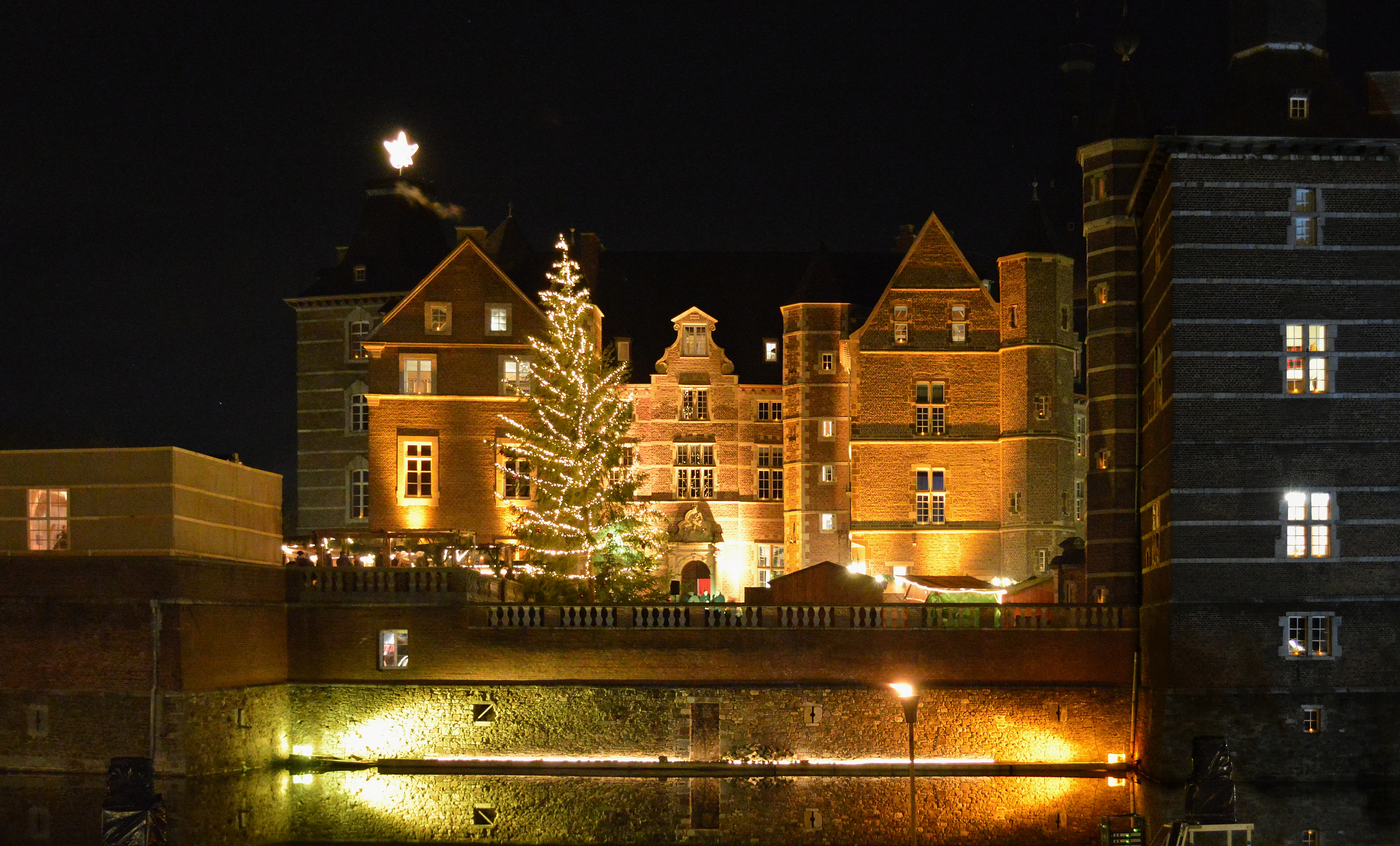 Mittelalterlicher Weihnachtsmarkt auf Schloss Merode bei Düren. Westseite 2015.